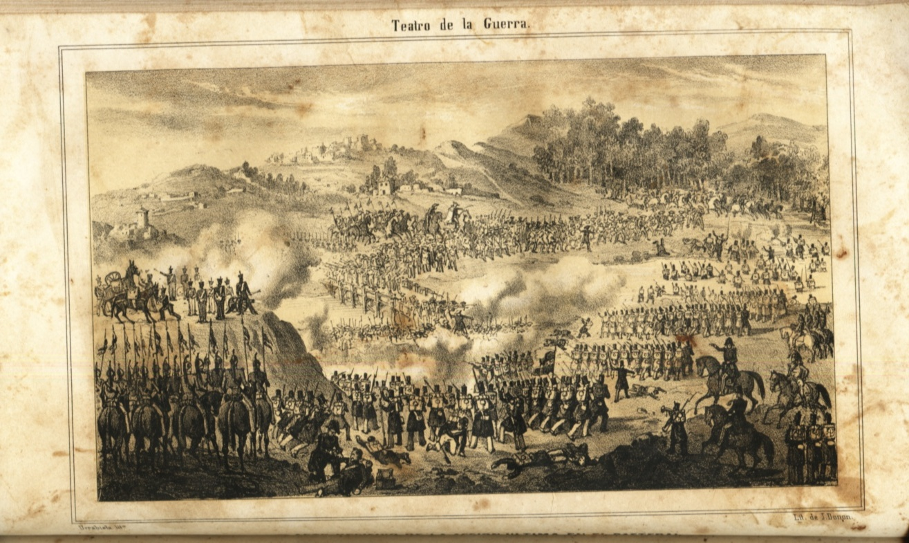 Teatro de la Guerra: Cabrera,los Montemolinistas y Republicanos en Cataluña. Autor Un testigo ocular de los acontecimientos (anónimo)